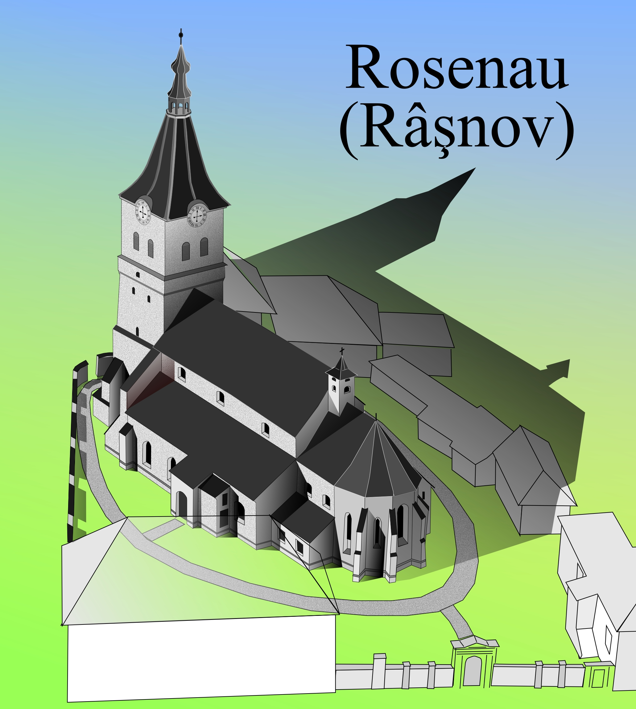 Biserica evanghelica din Rasnov